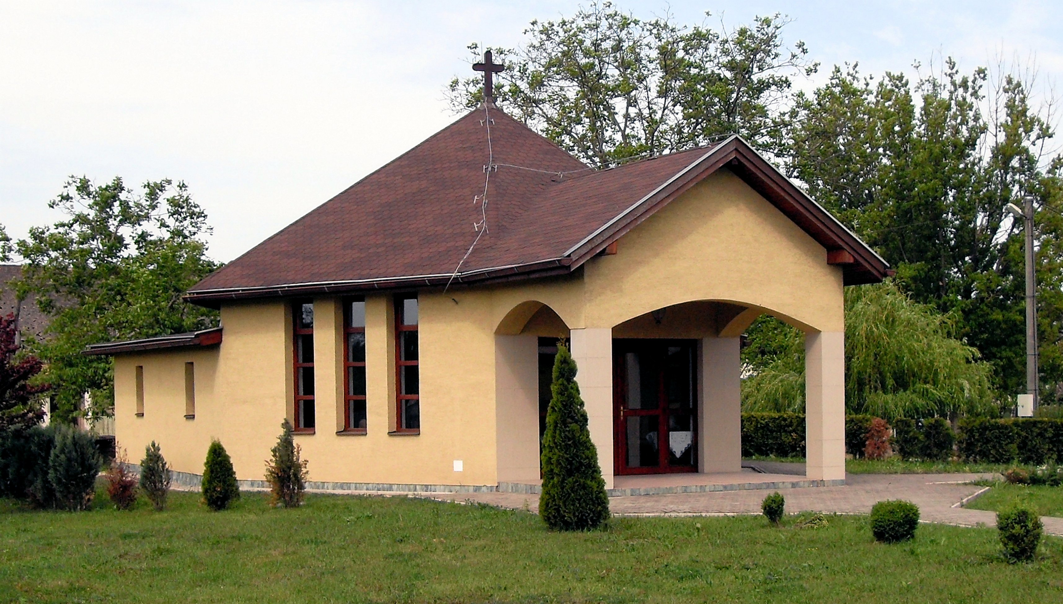 Veľká Ida, kaplnka v časti Gomboš